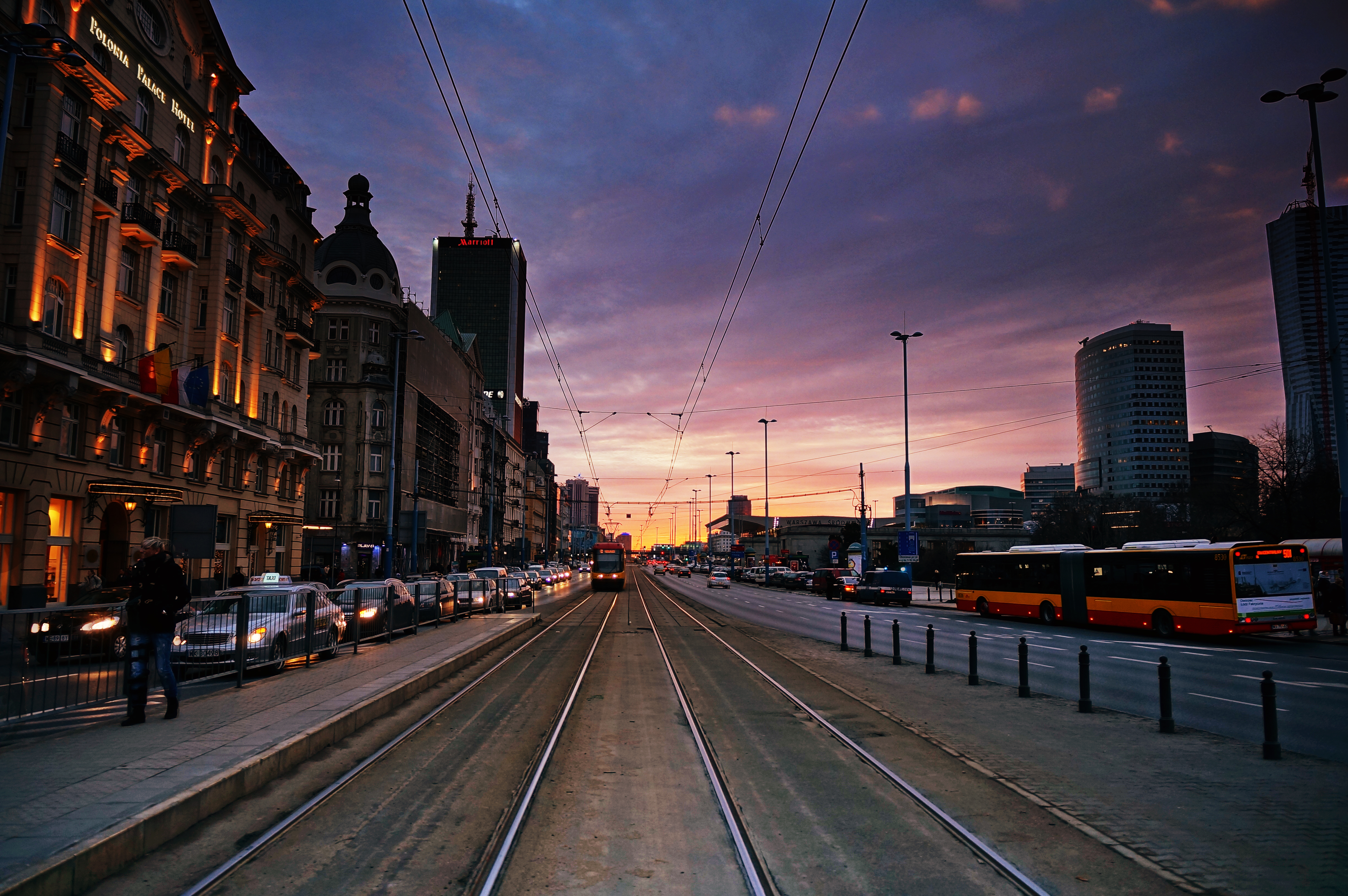 Aleje Jerozolimskie, widok z r. Dmowskiego w stronę zachodnią